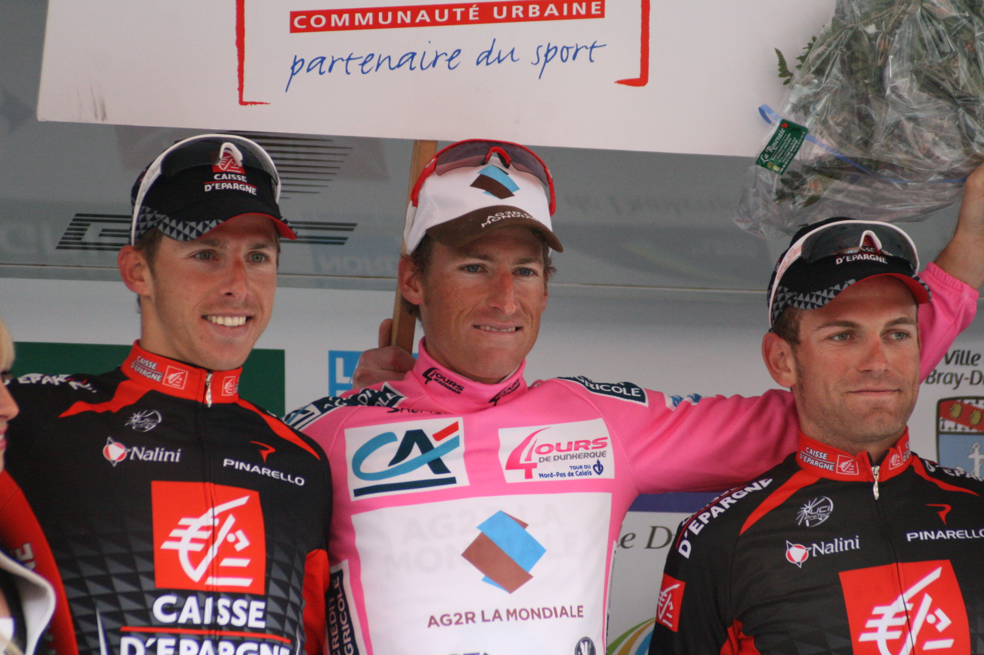 Rui Costa, Martin Elmiger et José Joaquín Rojas sur le podium de la 5e étape des Quatre jours de Dunkerque 2010